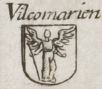 Беларуская (тарашкевіца): Герб Вількамірскага павету, пададзены асобна ад гербу Віленскага ваяводзтва з Пагоняй